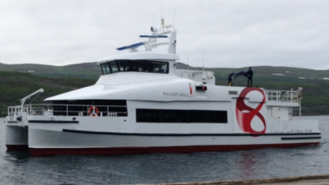 MS Falkefjell